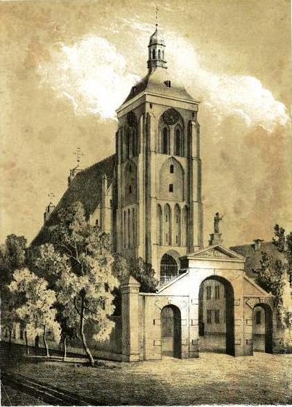 Gdańsk Stare Miasto, ul. Zaułek św. Bartłomieja 1 - Konkatedra greckokatolicka św. Bartłomieja i Opieki Najświętszej Bogurodzicy, 1486-1494, po 1945